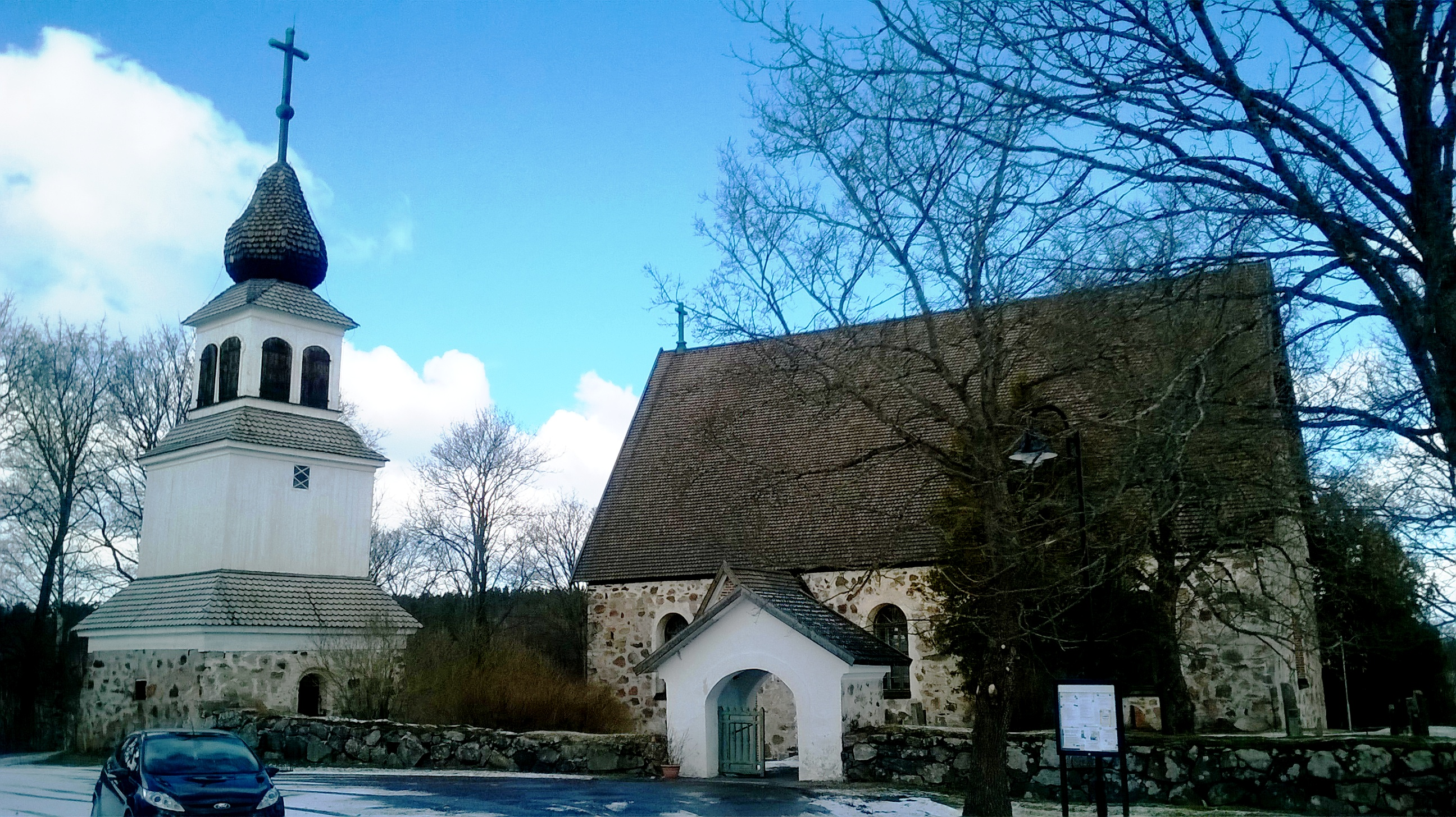 Karjaan kirkko